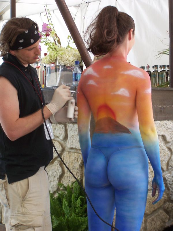 A model being bodypainted.